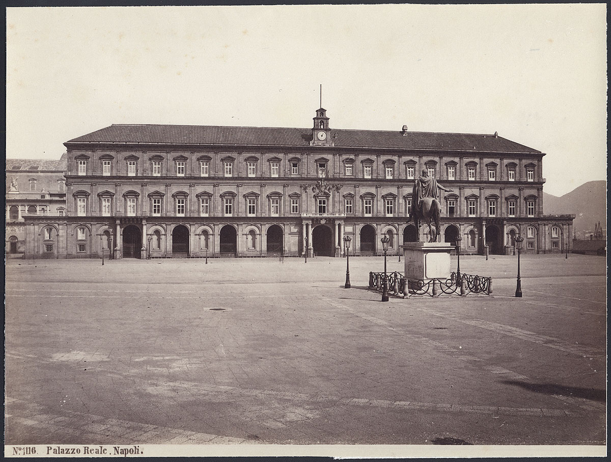 Giorgio Sommer, Albumin, aufgerollt auf Karton 17,8 x 24 cm. No. 1116: Palazzo Reale, Napoli, mit Prägestempel rechts unten im Bild: G. Sommer. Abgebildet in: Giorgio Sommer in Italien - Fotografien 1857 - 1888, München 1992, Seite 95.